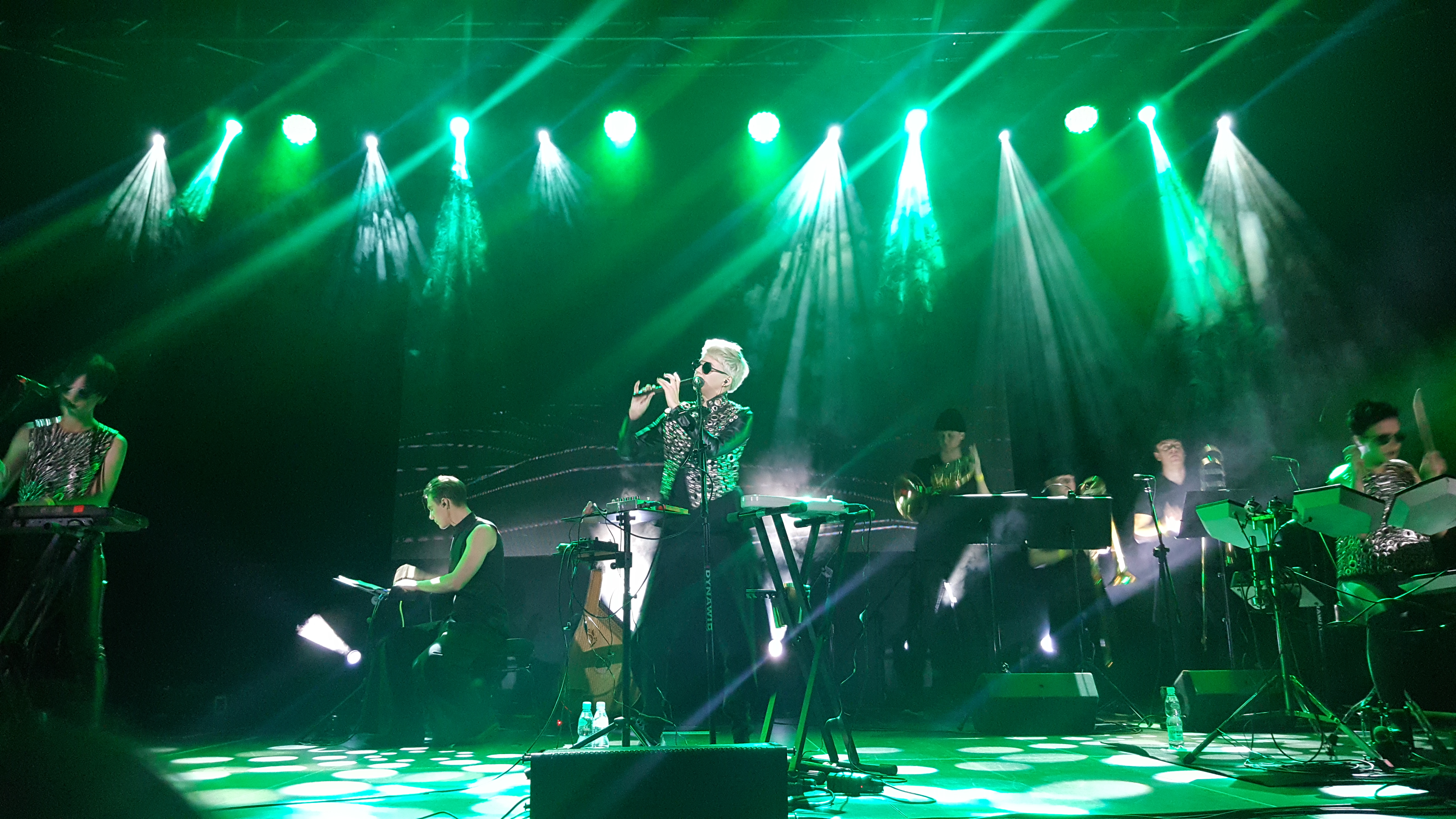 Ukraiński zespół ONUKA na koncercie w warszawskim teatrze Palladium w październiku 2017 roku.